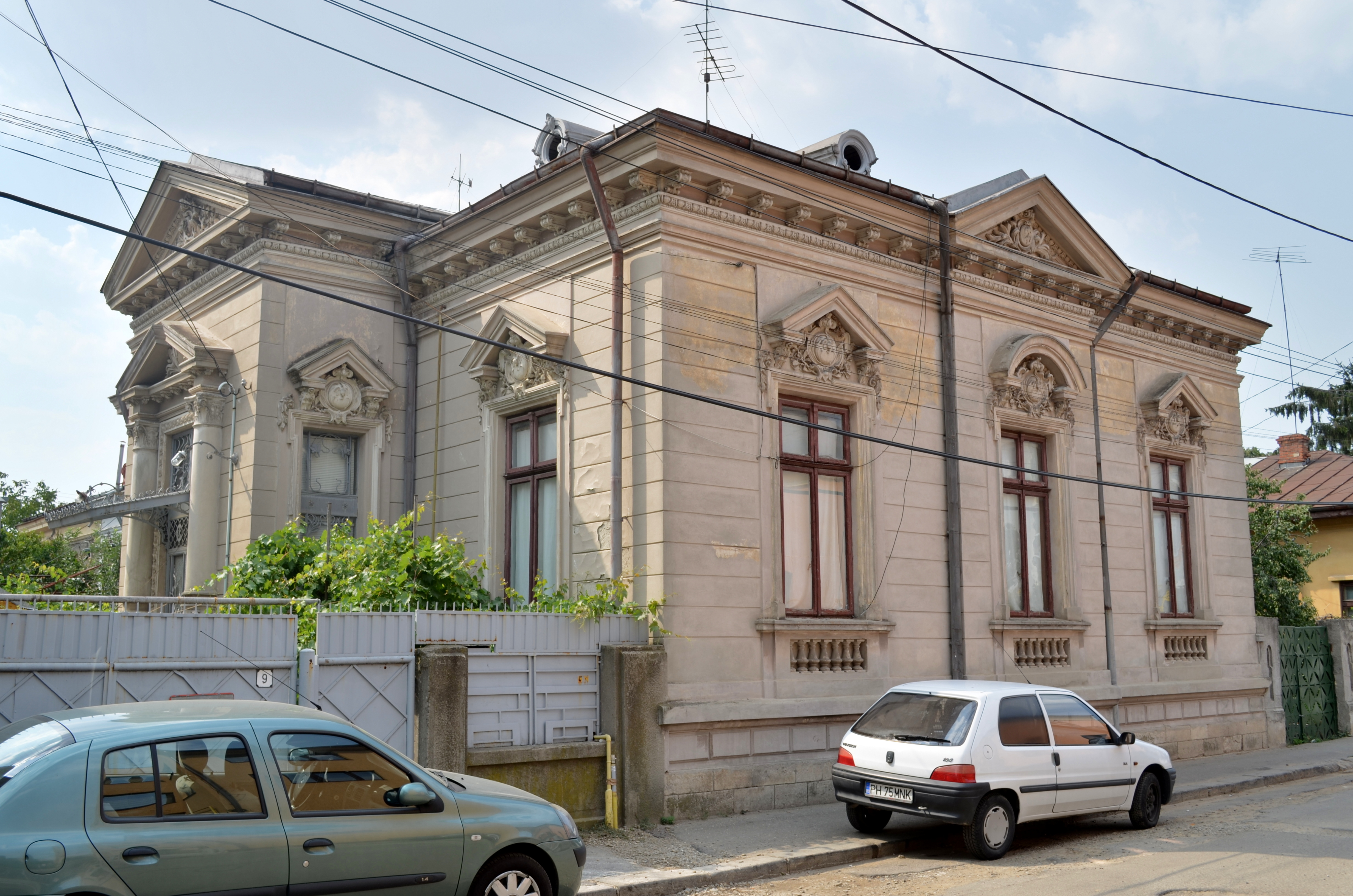 Casa dr. Ion Popescu, Str. Decebal nr. 9, Ploiești